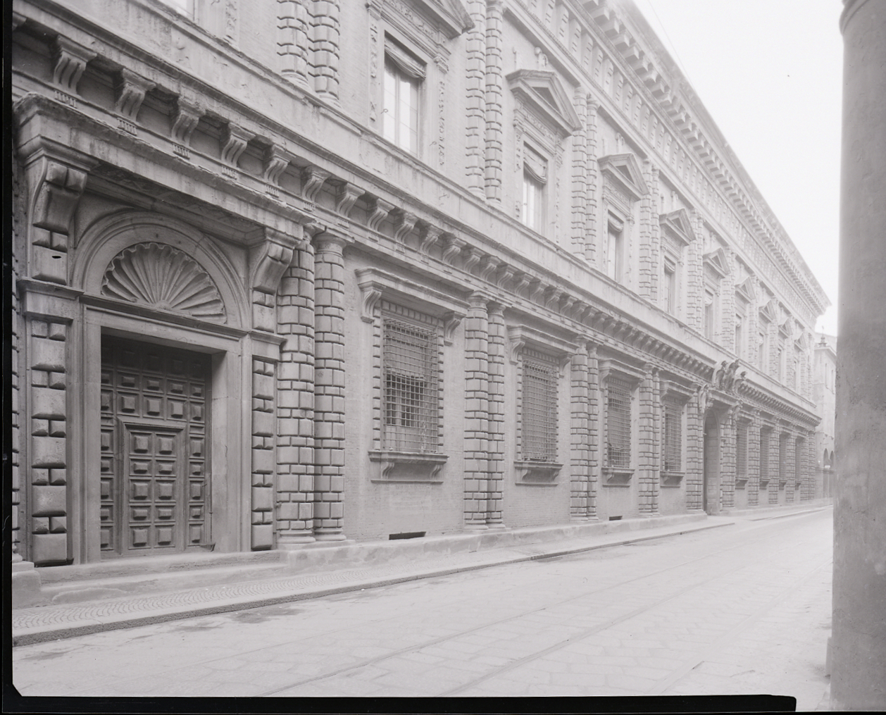 Servizio fotografico : Bologna, 1965 / Paolo Monti. - Buste: 8, Fototipi: 8 : Negativo b/n, gelatina bromuro d'argento/ pellicola ; 10x12. - ((Serie costituita da 8 negativi identificati con i nn.: 12141-12148. La suddetta serie è contenuta nella scatola identificata con la numerazione 12001-12500G. - Occasione: Campagna di rilevamento del centro storico del comune di Bologna. - Occasione: Documentazione per la pubblicazione: Emilio CECCHI, Natalino SAPEGNO (a cura di), Storia della Letteratura Italiana, 9 voll., Milano, Garzanti, 1966 e segg. - Fonte: Fattura di Paolo Monti: IV. Commesse/ Fattura (1969/05/09), presso Archivio Paolo Monti. - Fonte: Monografia di Cecchi Emilio, Sapegno Natalino (a cura di): Ordine e vaghezza: scultura in Emilia nell'età barocca, Bologna, Zanichelli (1966 e segg.)